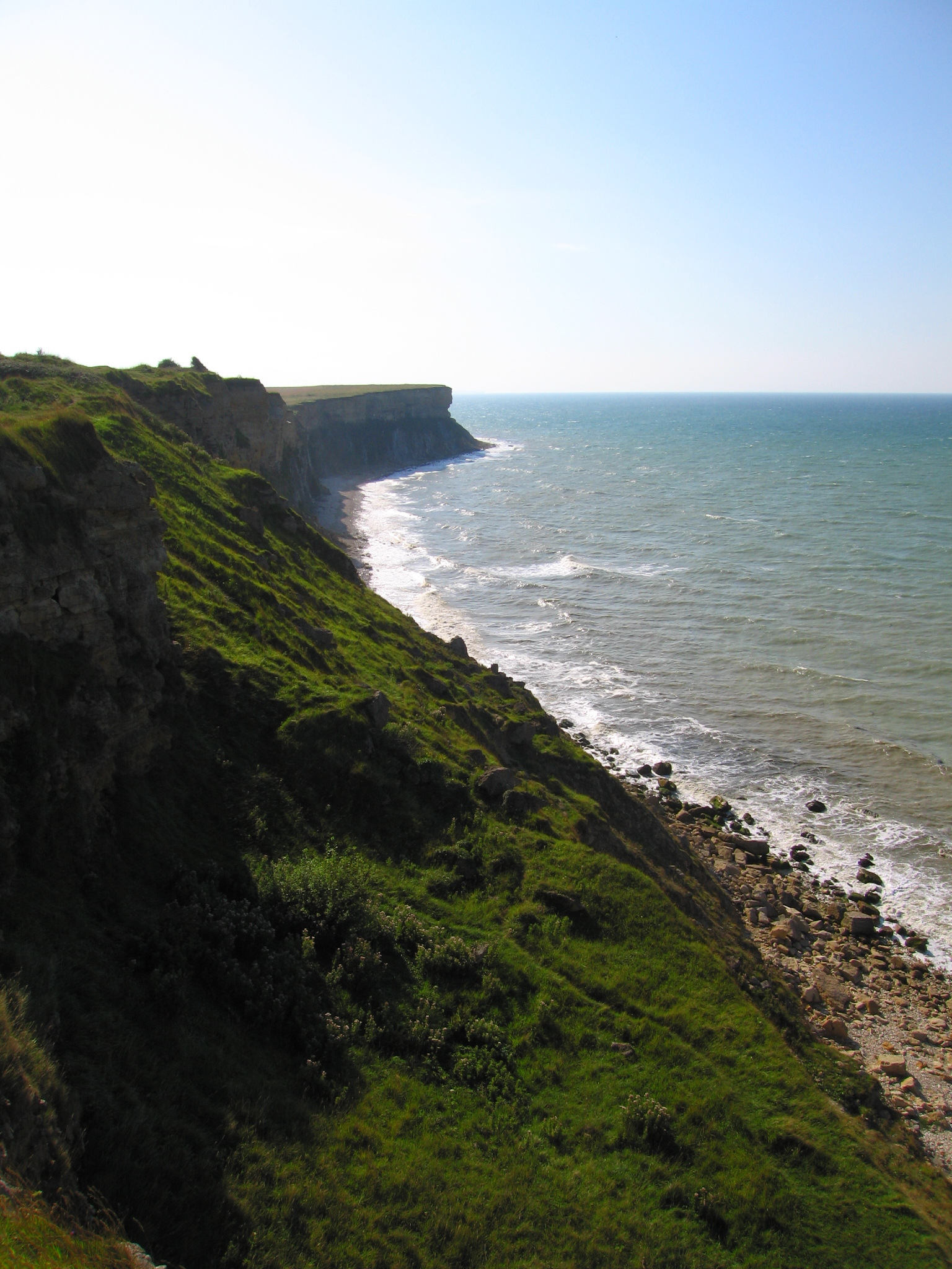 Falaise d'Arromanches